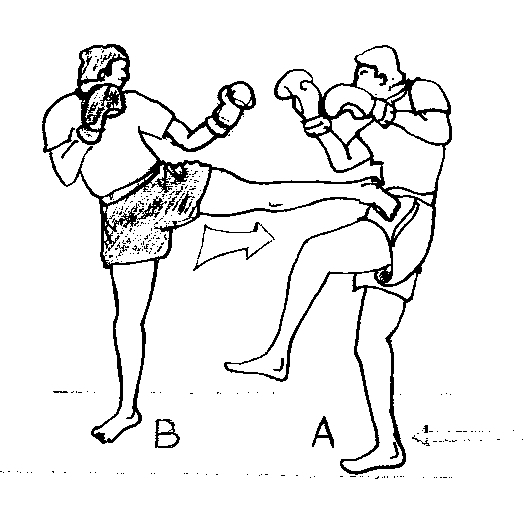 arret5.jpg